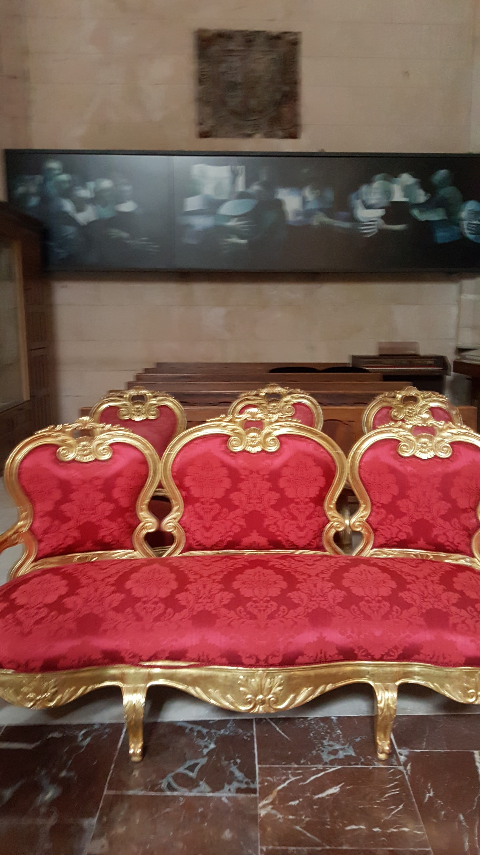 Vista frontal de la Capilla de la familia Escalada